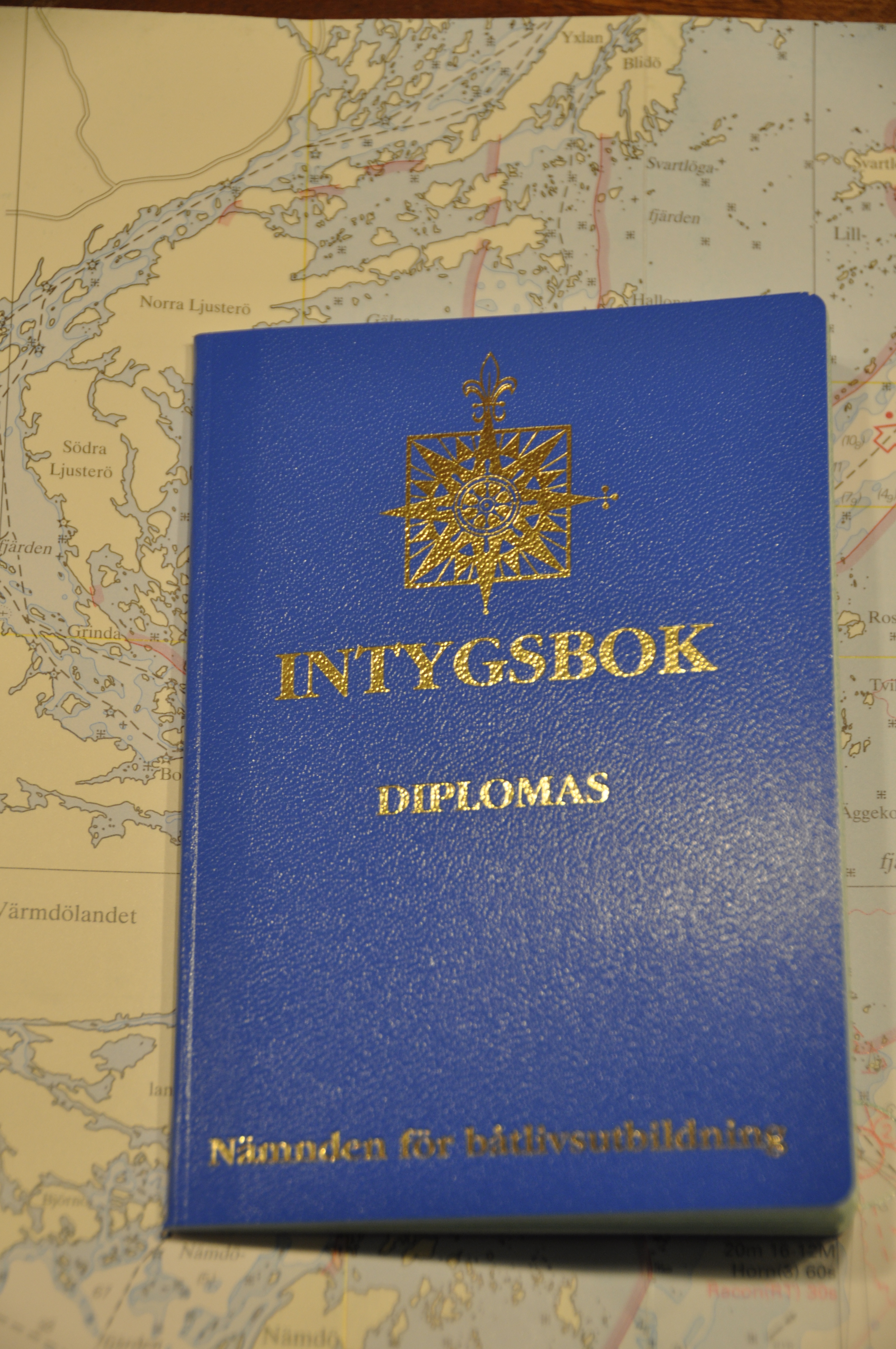 Förarintyg för fritidsbåt, utfärdat i Norrtälje 2014